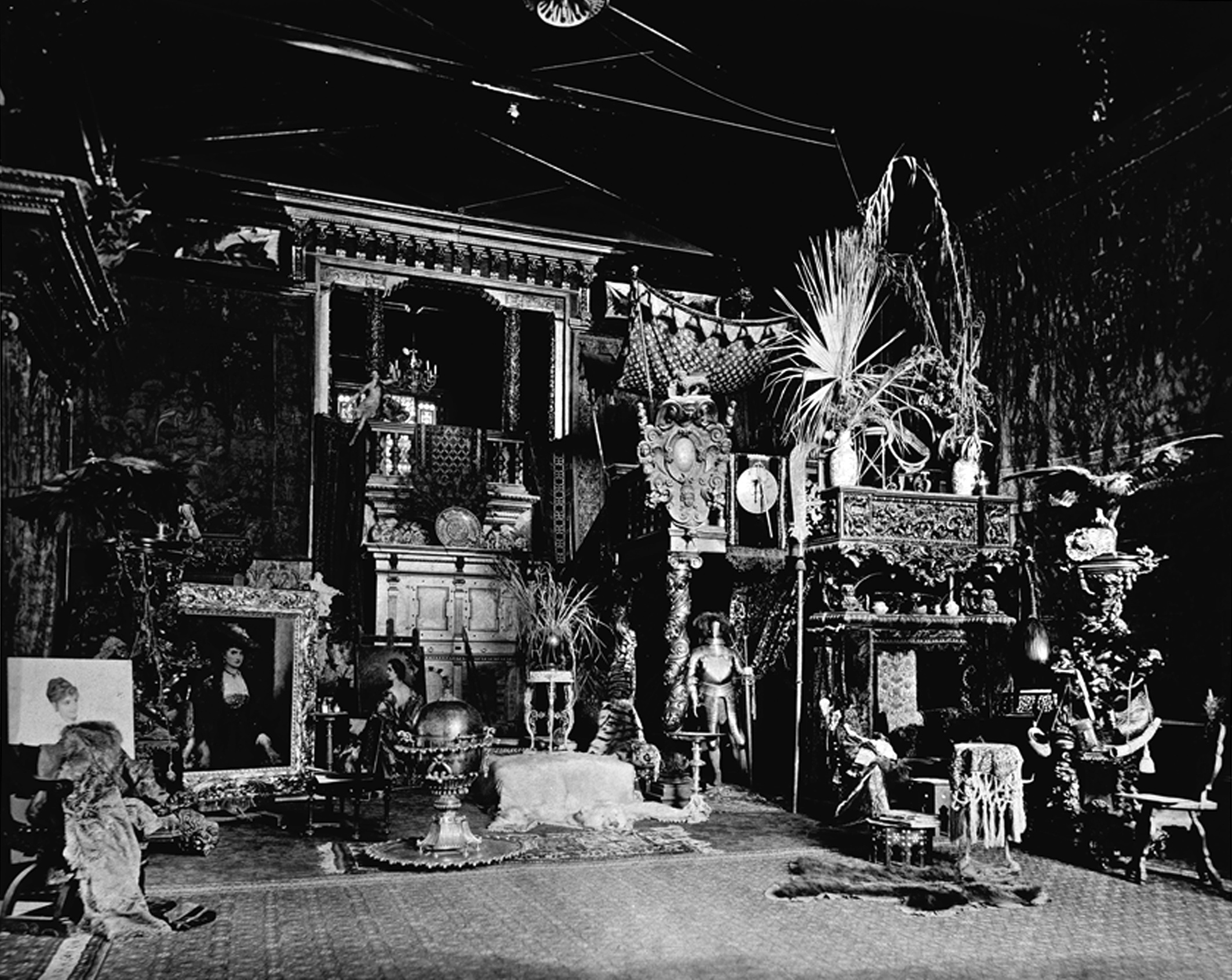 Atelier des österreichischen Malers Hans Makart (1840-1884) in Wien, Gründerzeit, um 1875